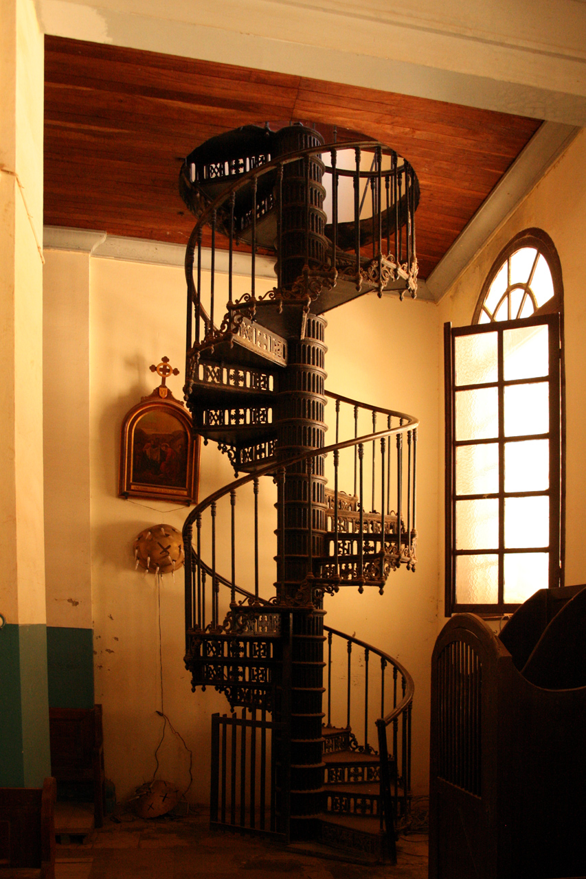 Escalier de l'église Saint Charles Borromée à Gorée